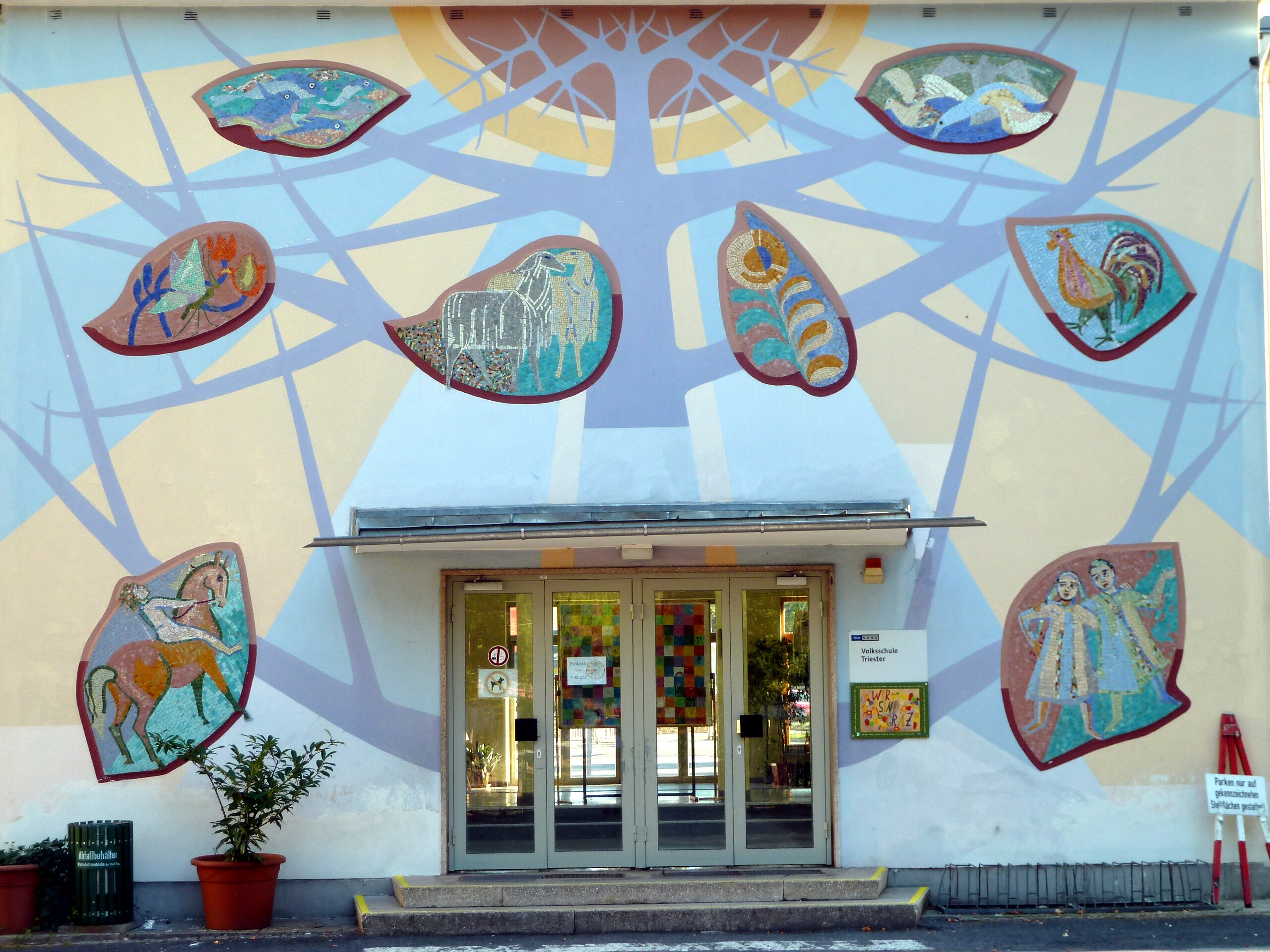 Mosaik Volksschule Triester/Allgemeine Sonderschule Triester, Graz